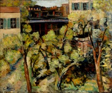 Tableau Jardin à la Ruche, de Léon Weissberg